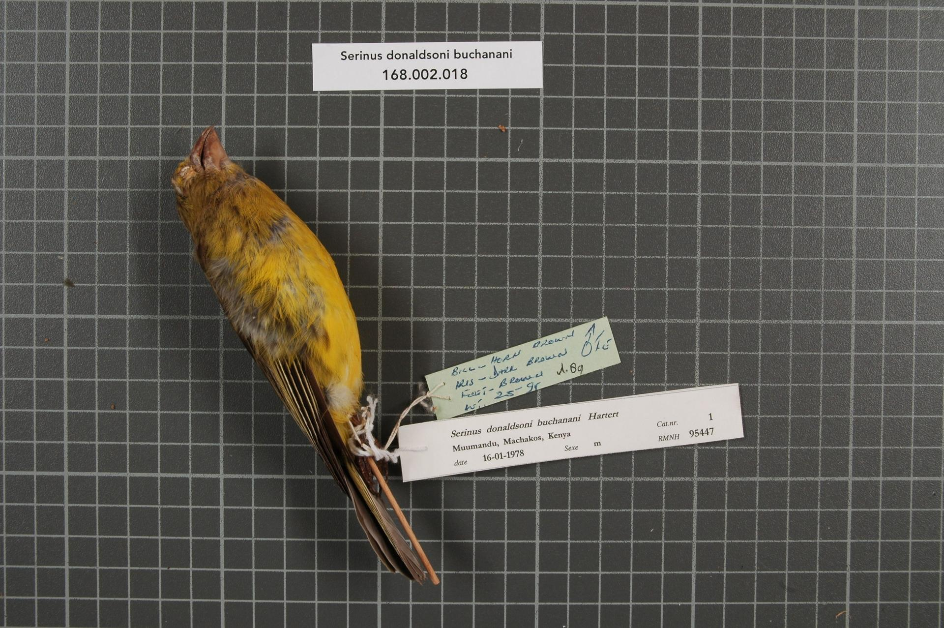 Serinus donaldsoni buchanani Hartert, 1919